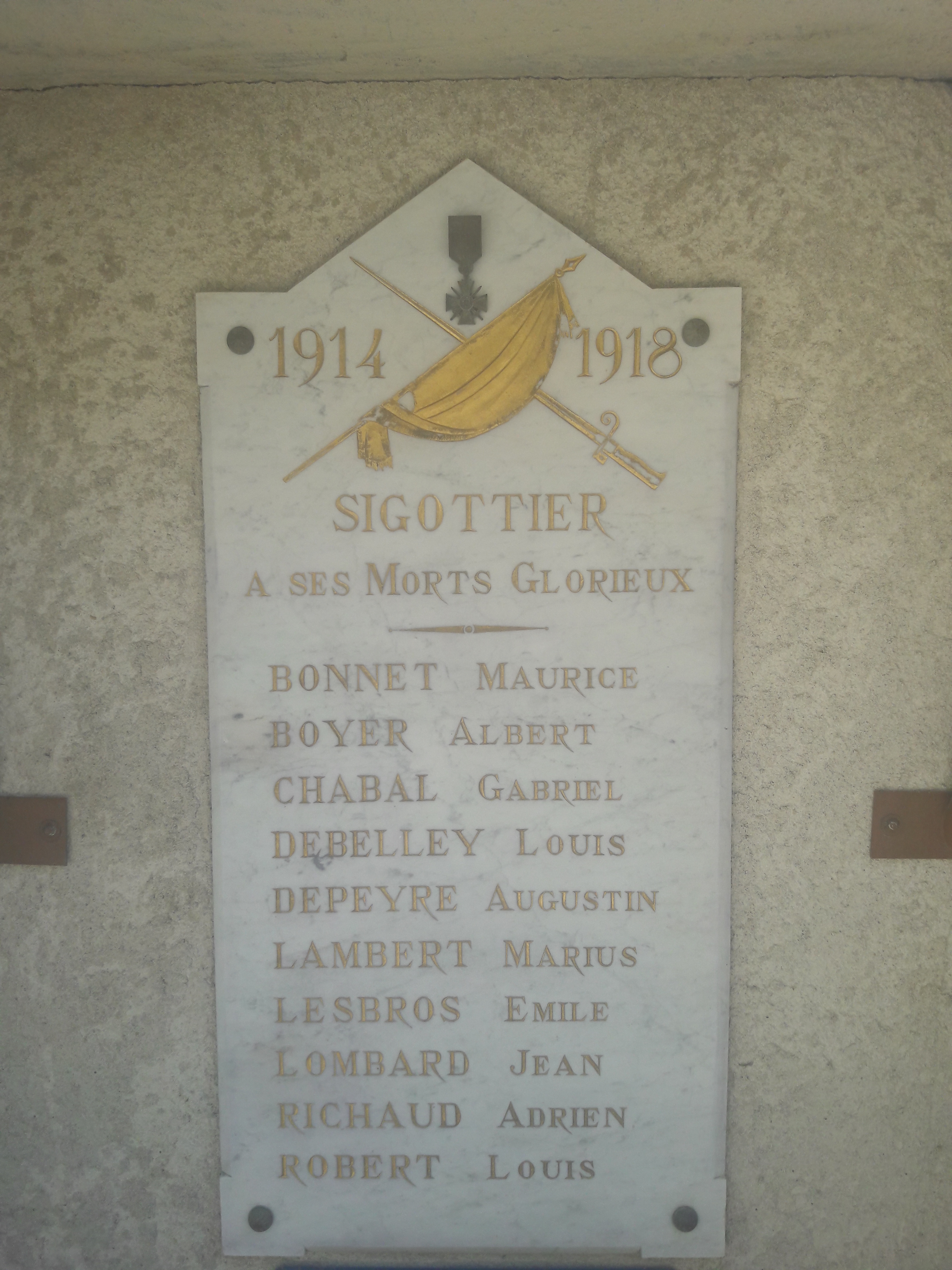 Plaque commémorative 14-18 de Sigottier